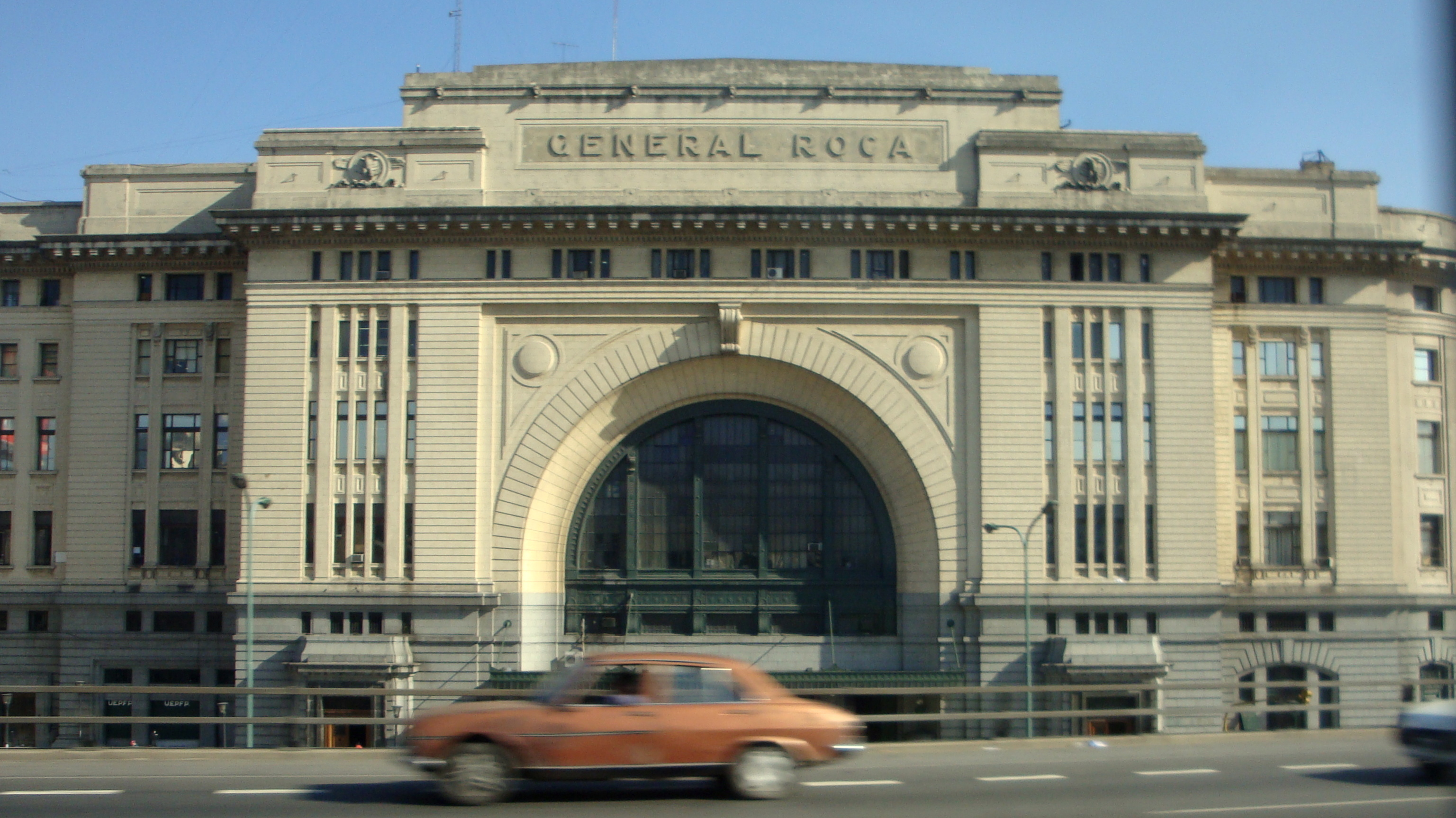 Estación Constitución vista desde la Autopista, observándose su entrada por la calle General Hornos.